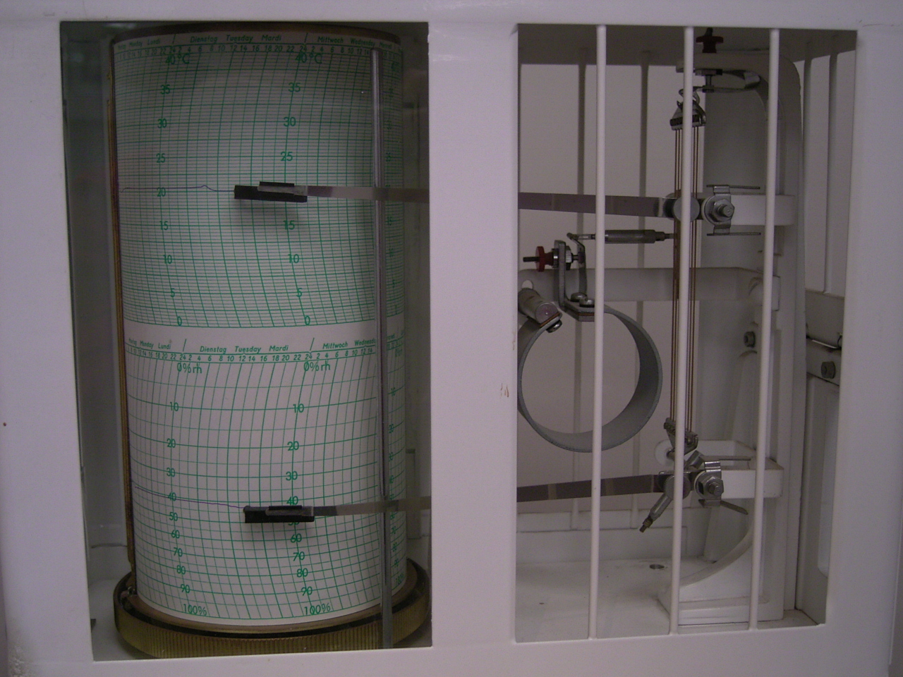 Thermohygrograph beim Museumseinsatz Fotograph oder Zeichner: Benutzer:Hafenbar